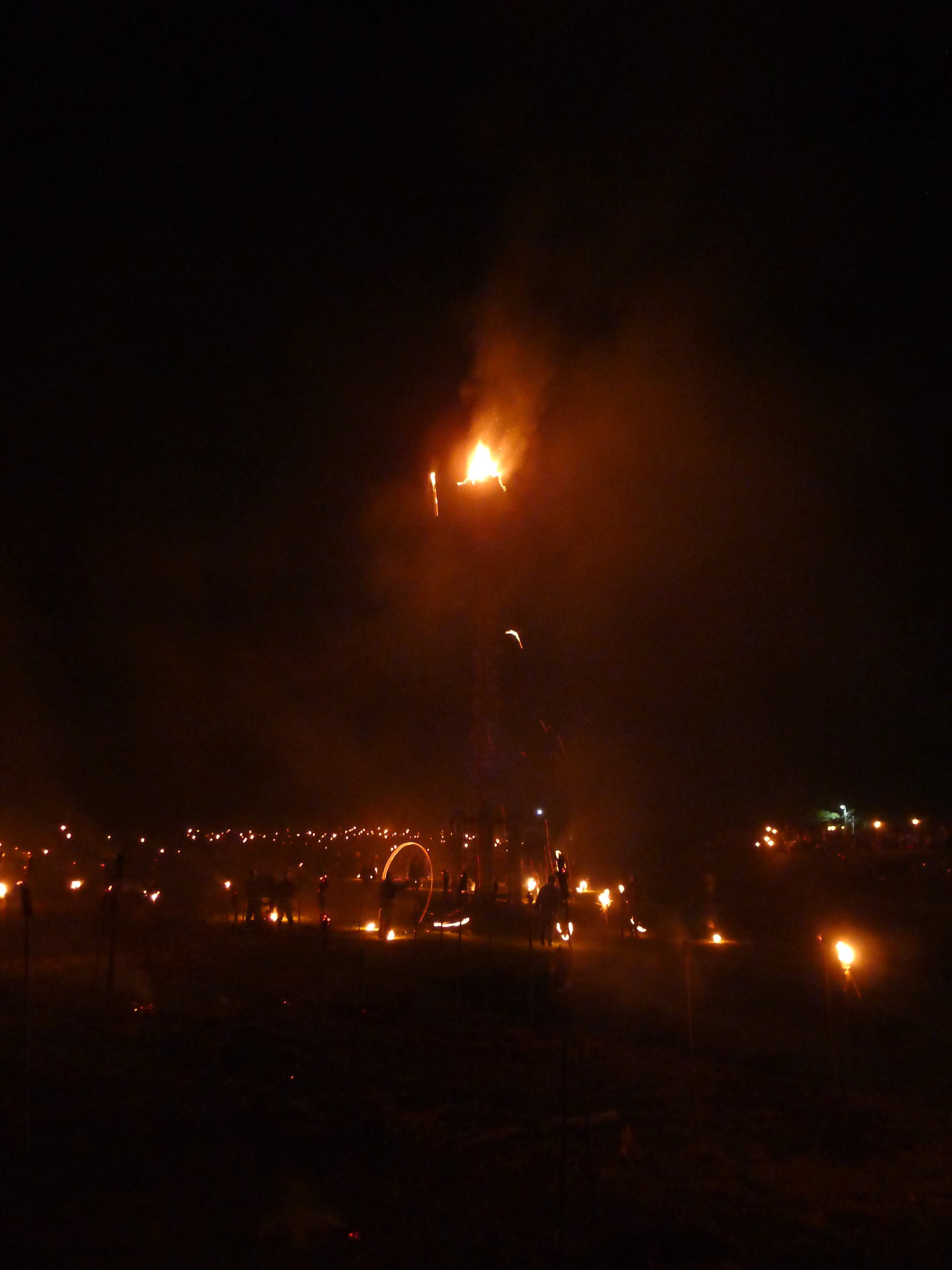 広河原松上げー燈籠木(とろぎ)という高さ20mの柱の上の籠に向け、放り上げ松という小松明に紐を結んで回し投入れる